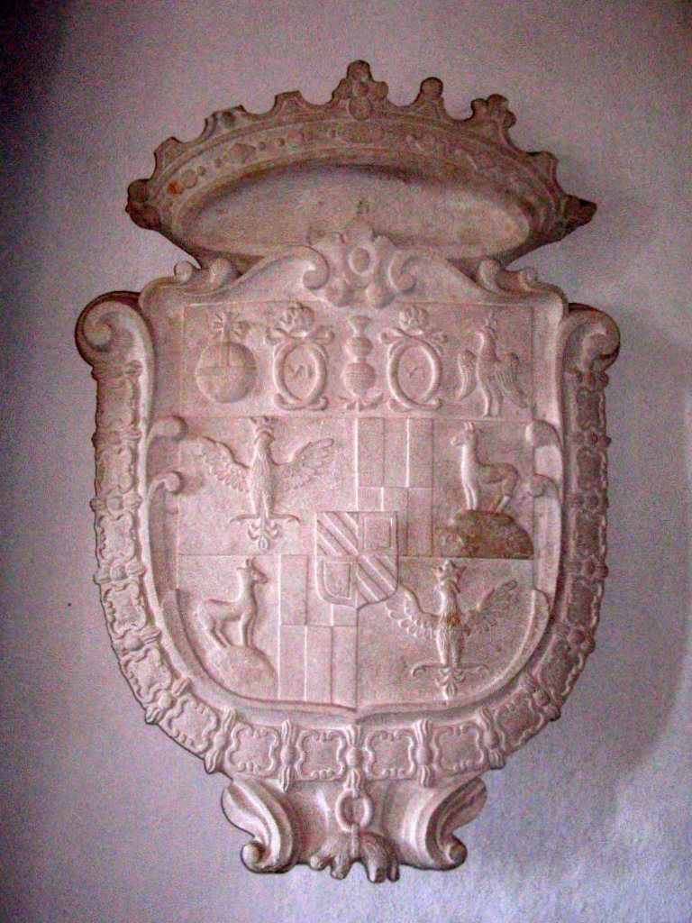 Predjama Castle, near Postojna, Slovenia, grb Cobenzl